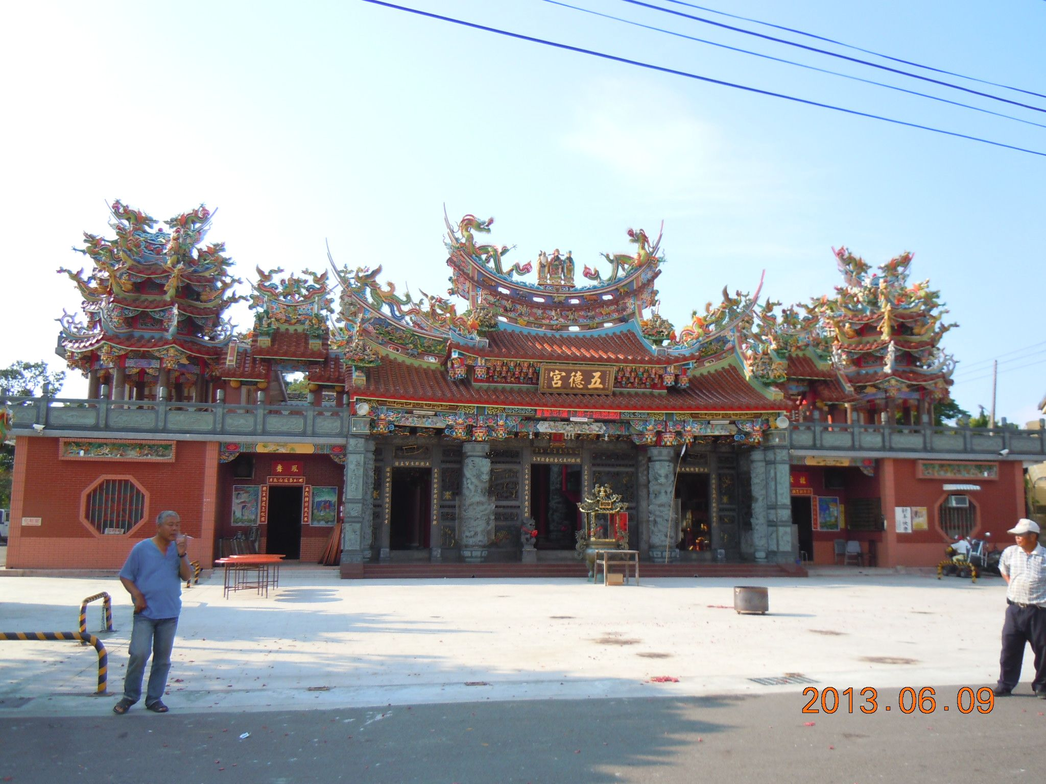 中文（台灣）: 後龍五德宮，地址：苗栗縣後龍鎮東明里頂浮尾55號。